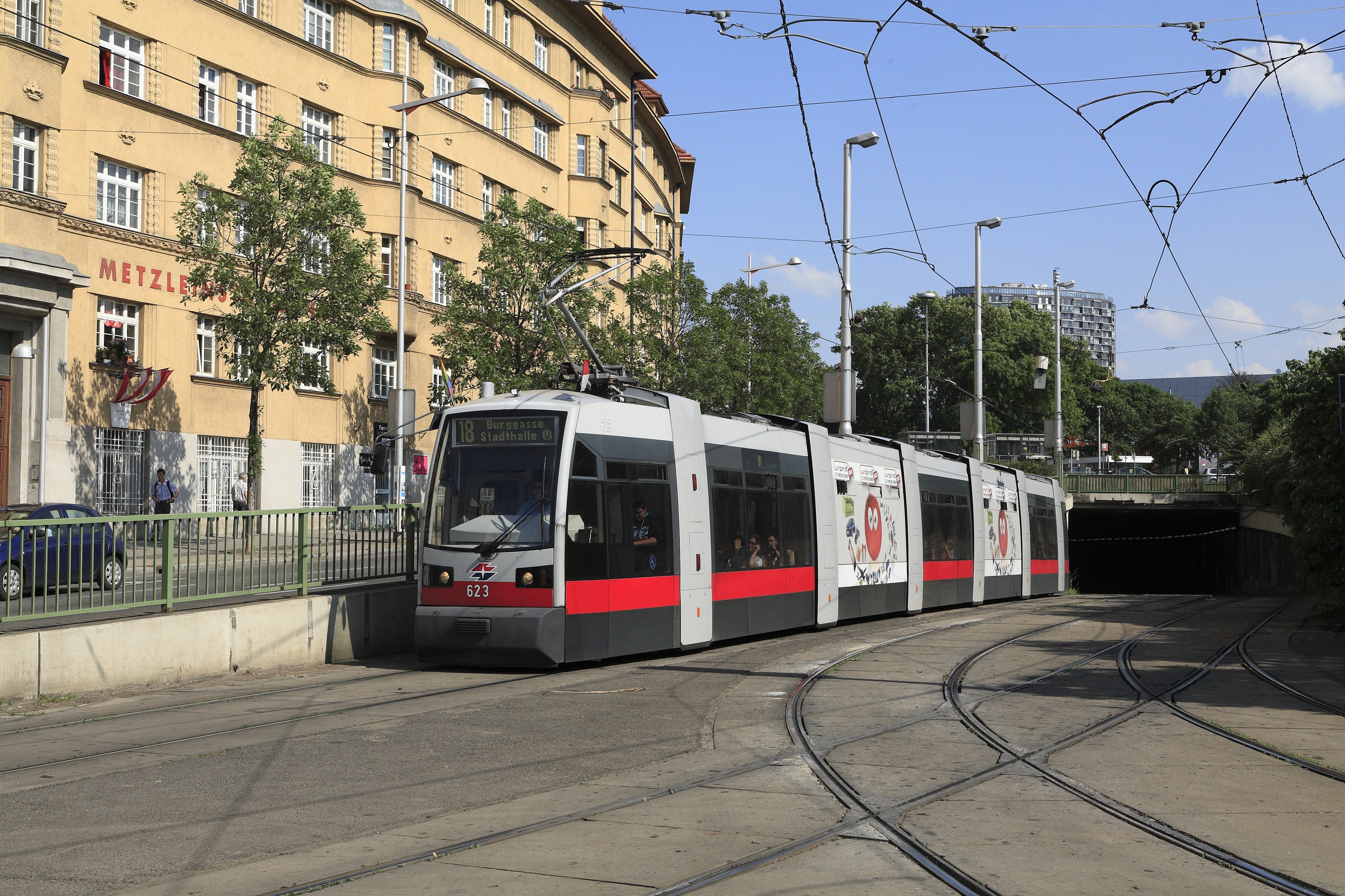 ULF Typ B, Zug der Linie 18 von der Schlachthausgasse nach Burgasse/Stadthalle nach dem Verlassen des Ustrab-Tunnels.